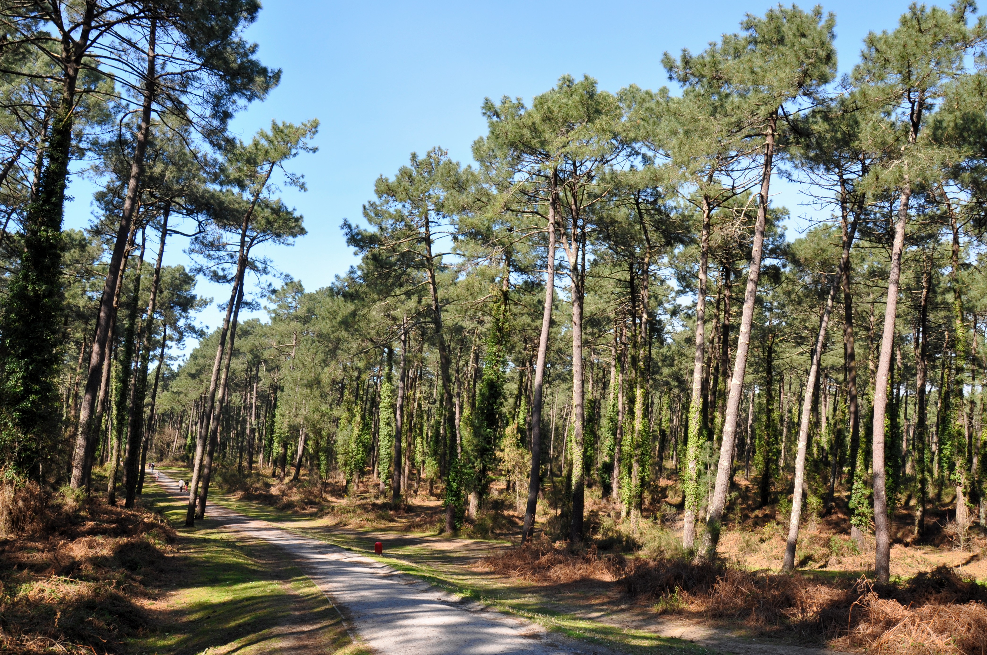 Forêt Pignada - Anglet